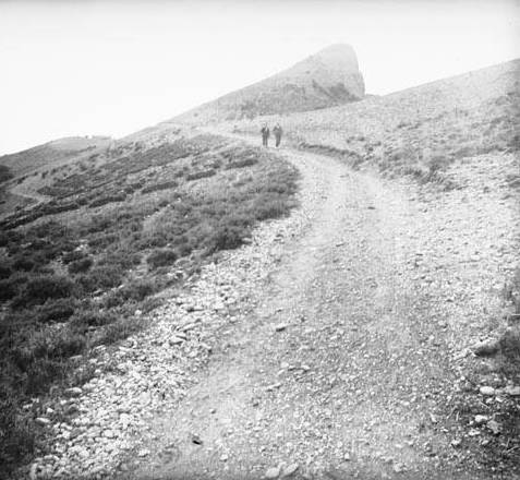 Imatge